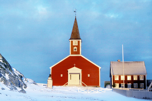 Hans Egedes kirke i Nuuk, Grønland